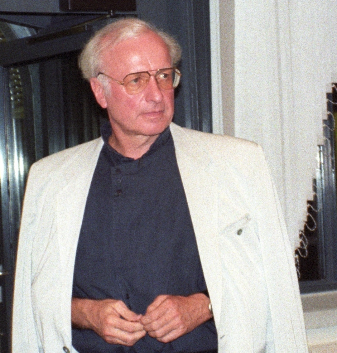 Dirigent Gerd Albrecht im Foyer der Hamburgischen Staatsoper